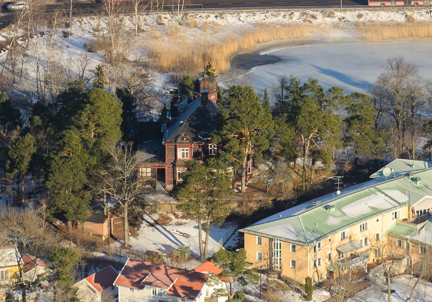 Villa Gadelius, Saltsjöbaden, från 1896, arkitekt Gustaf Wickman